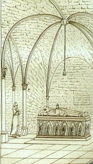 Vue du tombeau d'Abélaird à Saint-Marcel. Gravure de Laurent Guyot d'après un dessin d'Alexandre Lenoir (1761-1839) parue dans Le Musée des monuments français. Il s'agit du premier monument funérarie érigé après la mort de Pierre Abélard (1079-1142) dans le prieuré clunisien de Saint-Marcel, près de Chalon-sur-Saône.